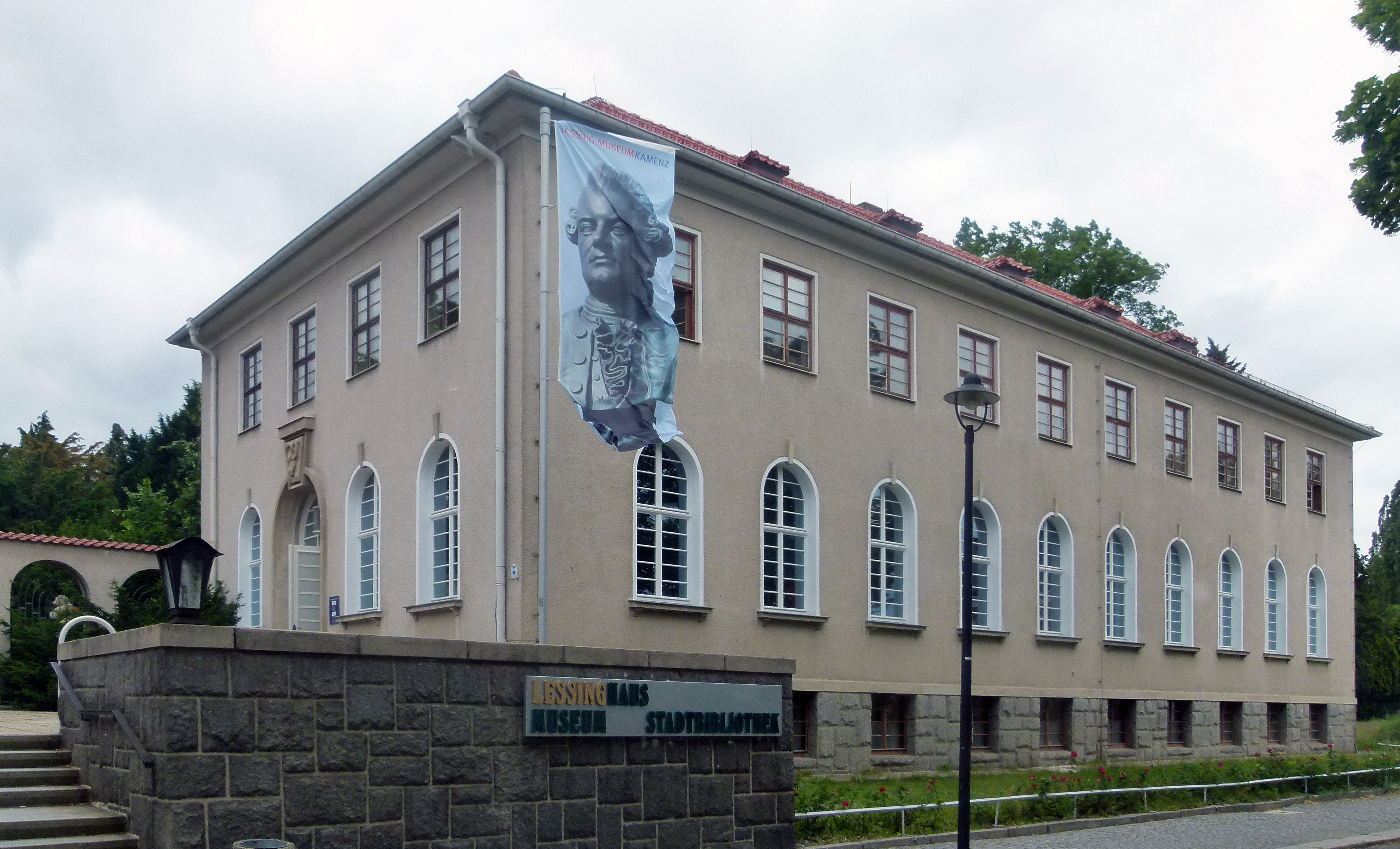 Lessinghaus in Kamenz, Sachsen